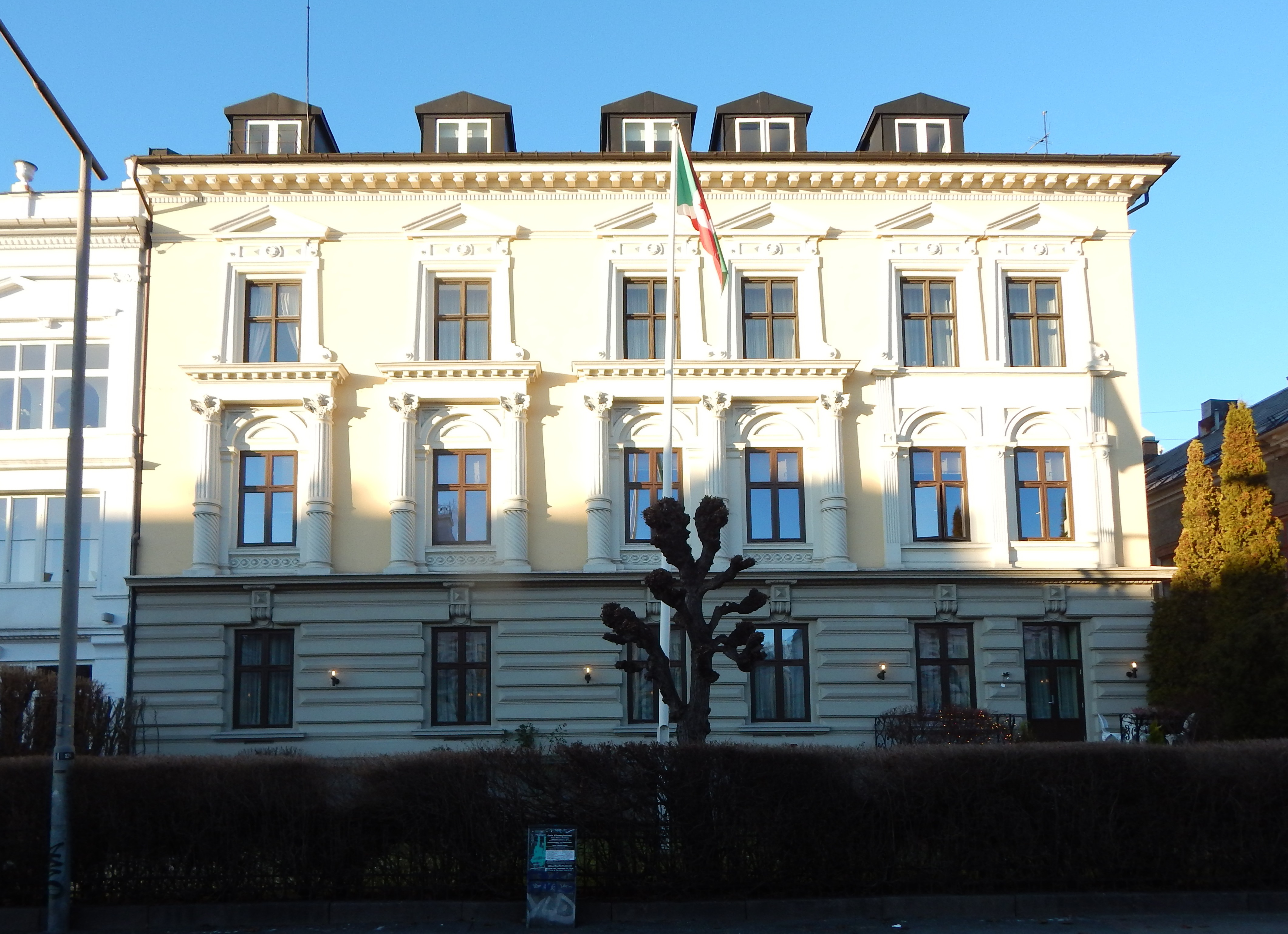 Oscars gate 57 med Burundis ambassade i Oslo